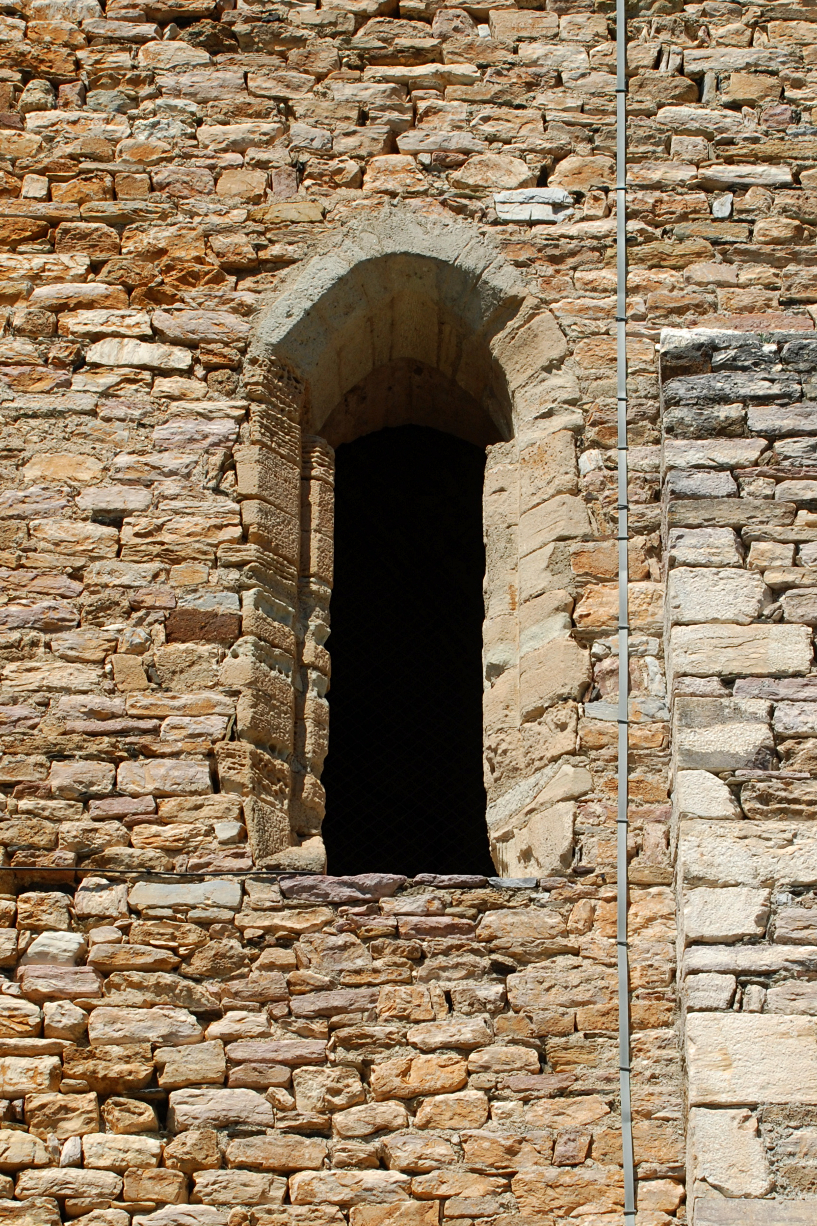 France - Languedoc - Hérault - Olargues - Église Saint-Laurent .